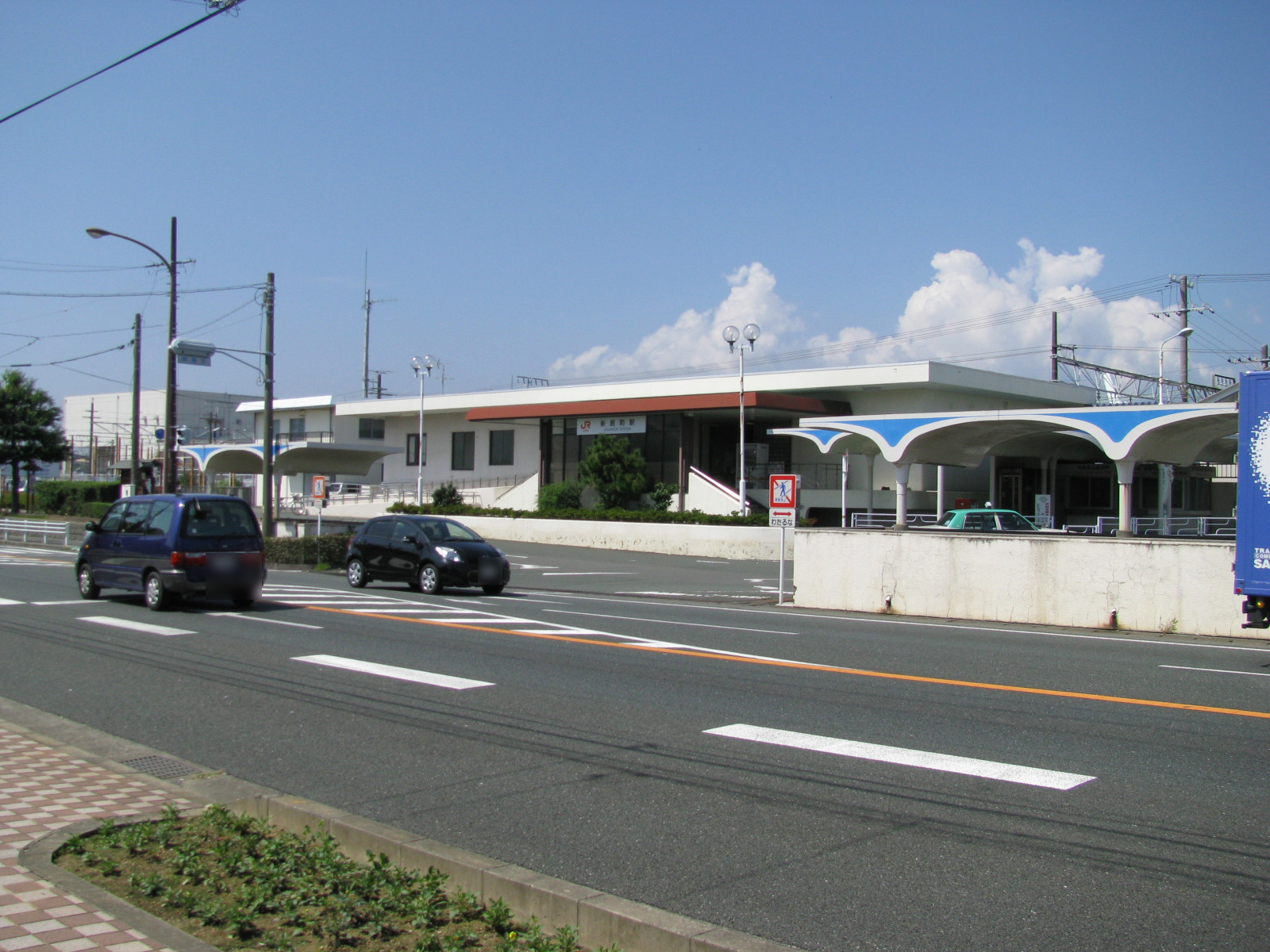 新居町駅